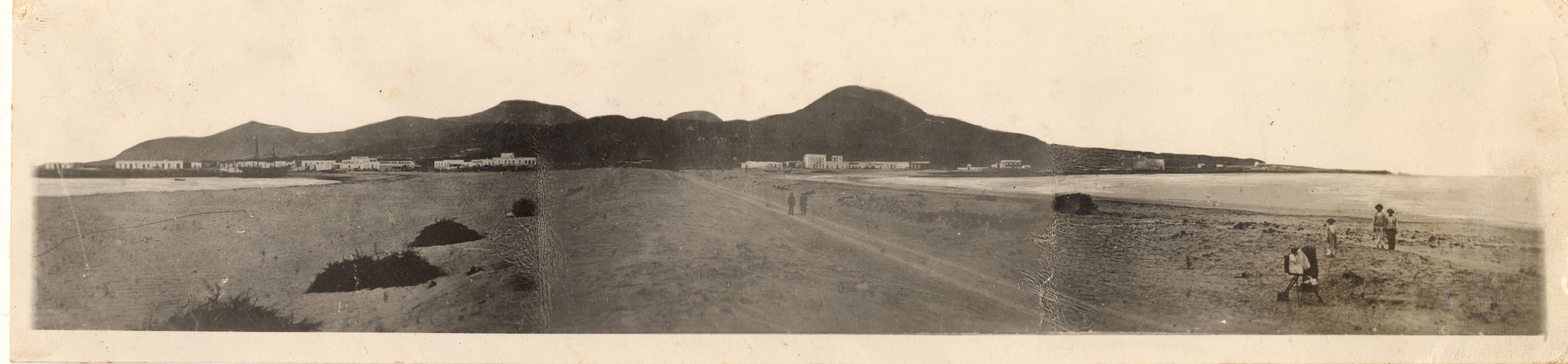 Panorámica del istmo de Guanarteme, a la izquierda la Bahía del Confital y la derecha la Bahía de Las Isletas (o de La Luz). Las Palmas de Gran Canaria (Gran Canaria). Islas Canarias, España.